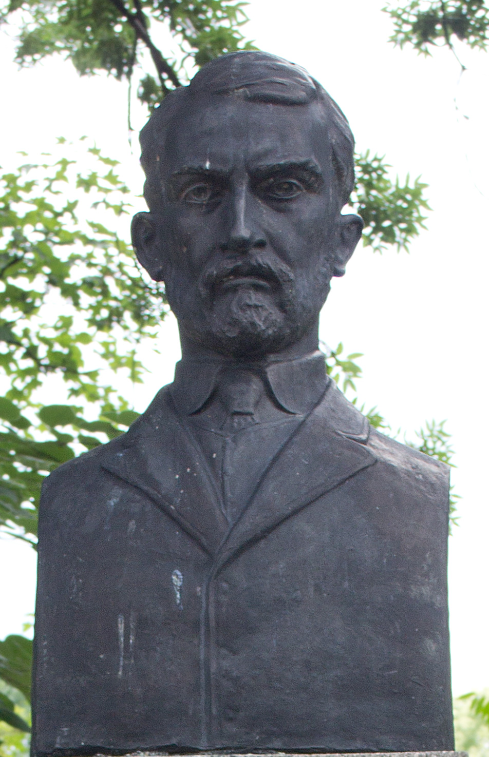 Büste von Gheorghe Popa de Teiuş (1824-1867) in Arad (Rumänien).